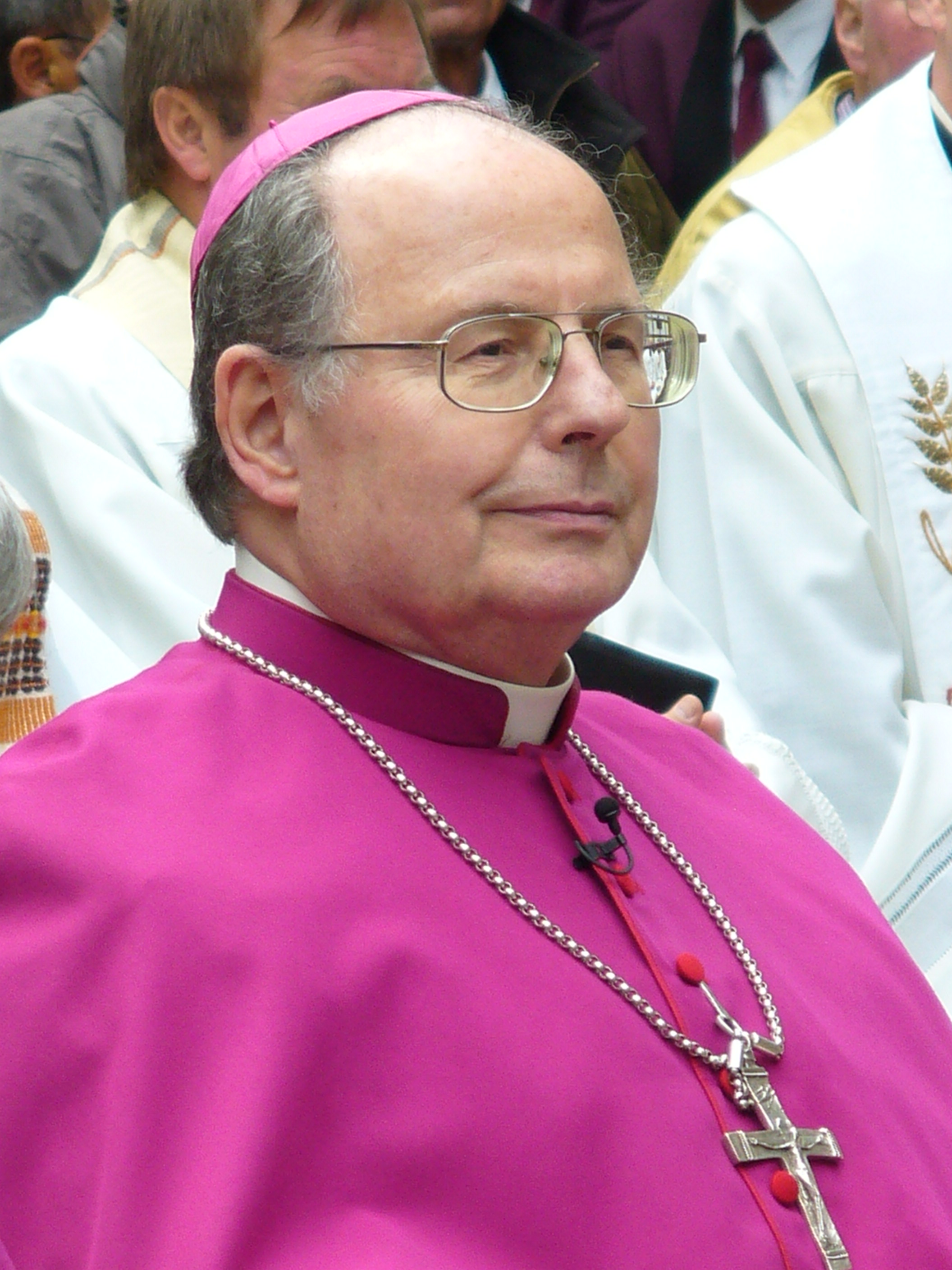 Bischof Joachim Wanke bei der 51. Männerwallfahrt zum Klüschen HagisBishop Joachim Wanke at the Pilgrimage of Men to Klüschen Hagis